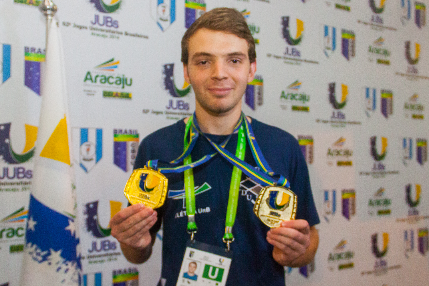 Foto: Mariana Costa